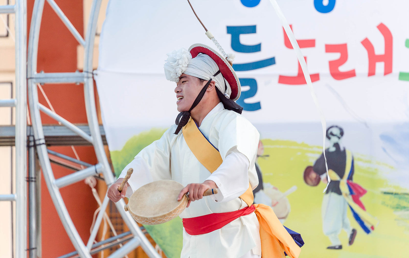 증평에서-청월